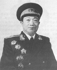 李雪三中将1955年授衔照